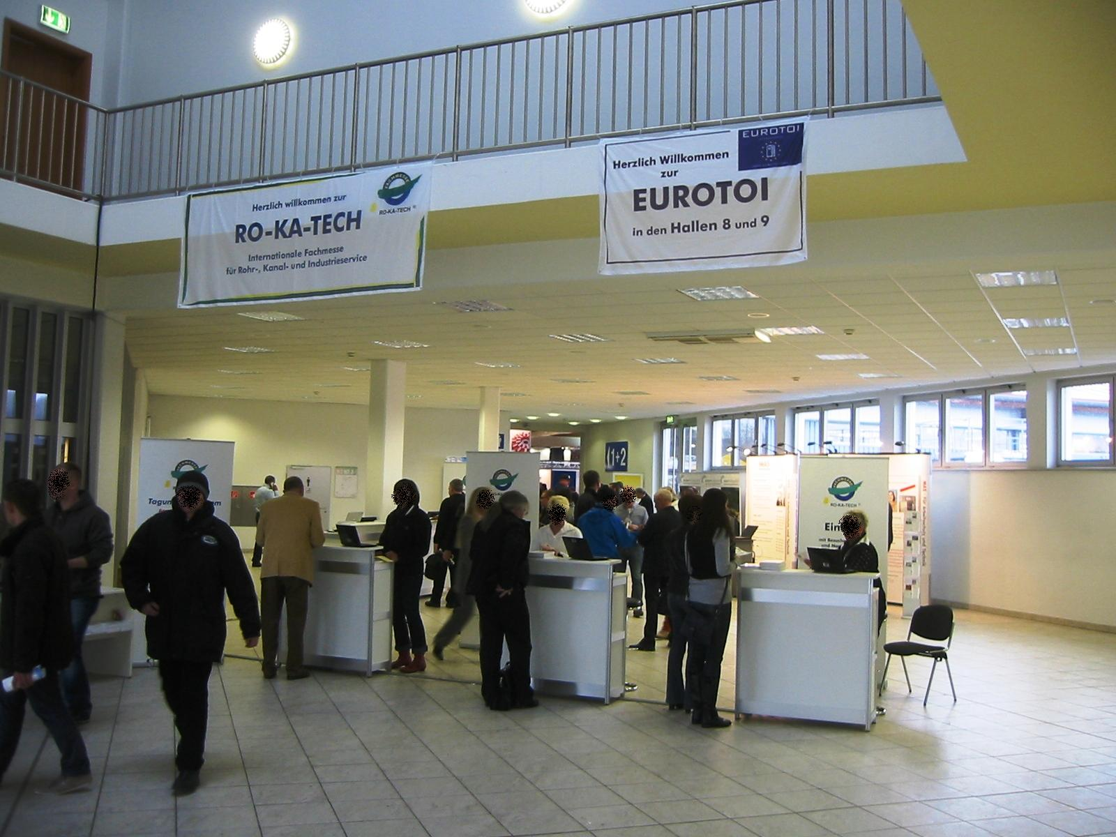 Eingangsbereich der RO-KA-TECH, Europas größter Messe für die unterirdische Wasserinfrastruktur, März 2013